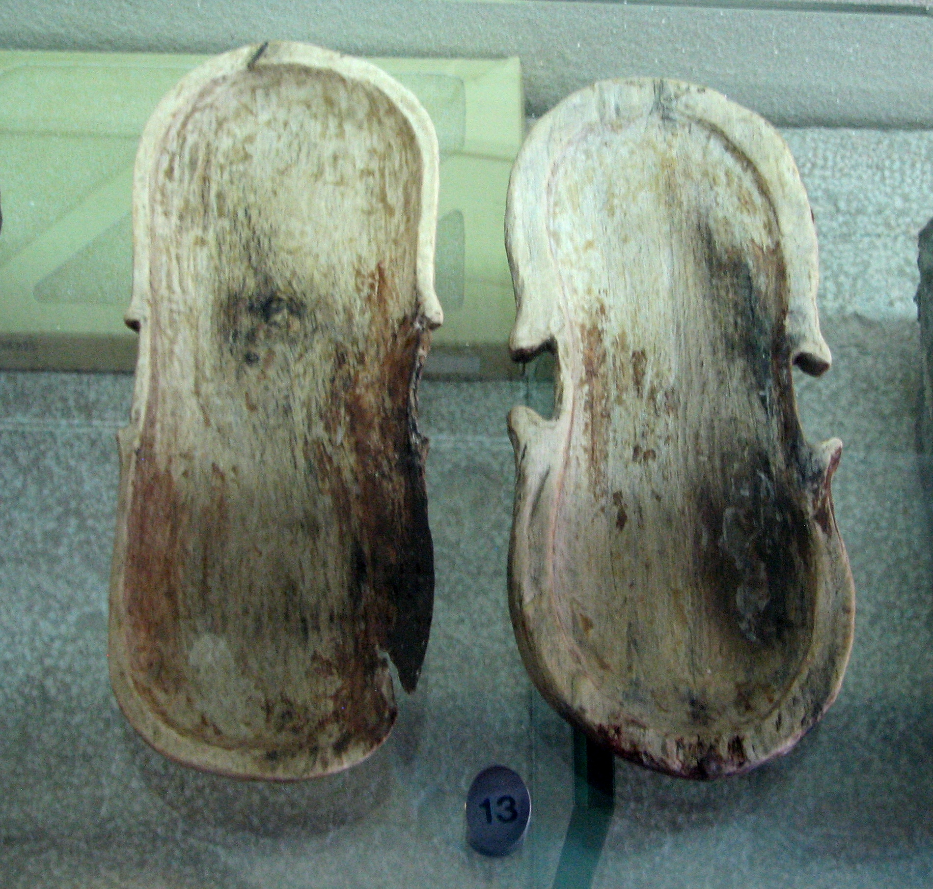 The Ma'agan Michael Ship is a 5th-century BC merchantman discovered off the coast of Ma'agan Michael, Israel, in 1985. הספינה העתיקה ממעגן מיכאל, היא ספינת סוחר פניקית מעץ מסוף המאה החמישית לפנה"ס שהתגלתה ב-1985 בים במרחק 70 מטר מחוף קיבוץ מעגן מיכאל בעומק של שני מטר קופסה דמוית כינור